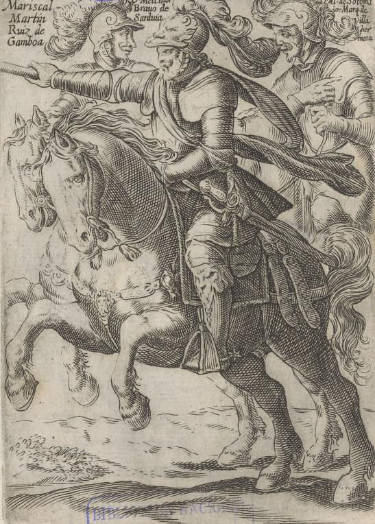 Martín Ruiz de Gamboa, Melchor Bravo de Saravia y Alonso de Sotomayor, conquistadores españoles. Aguafuerte y buril, anónimo italiano, siglo XVII